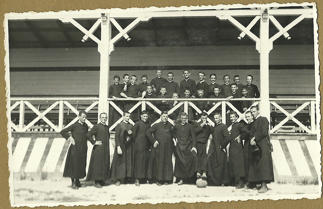 Don Francesco Babini è il prete a destra con il piede sul pallone (sua grande passione); il quarto da sinistra è don Duilio Mengozzi I giovani seminaristi della diocesi di Sansepolcro sono ritratti al Campo Sportivo cittadino Buitoni.